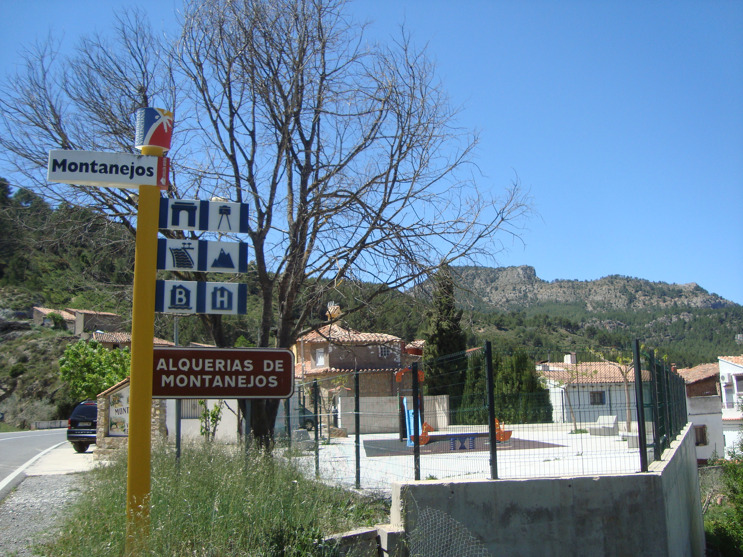 Alquerias de Montanejos, comarca Alto Mijares